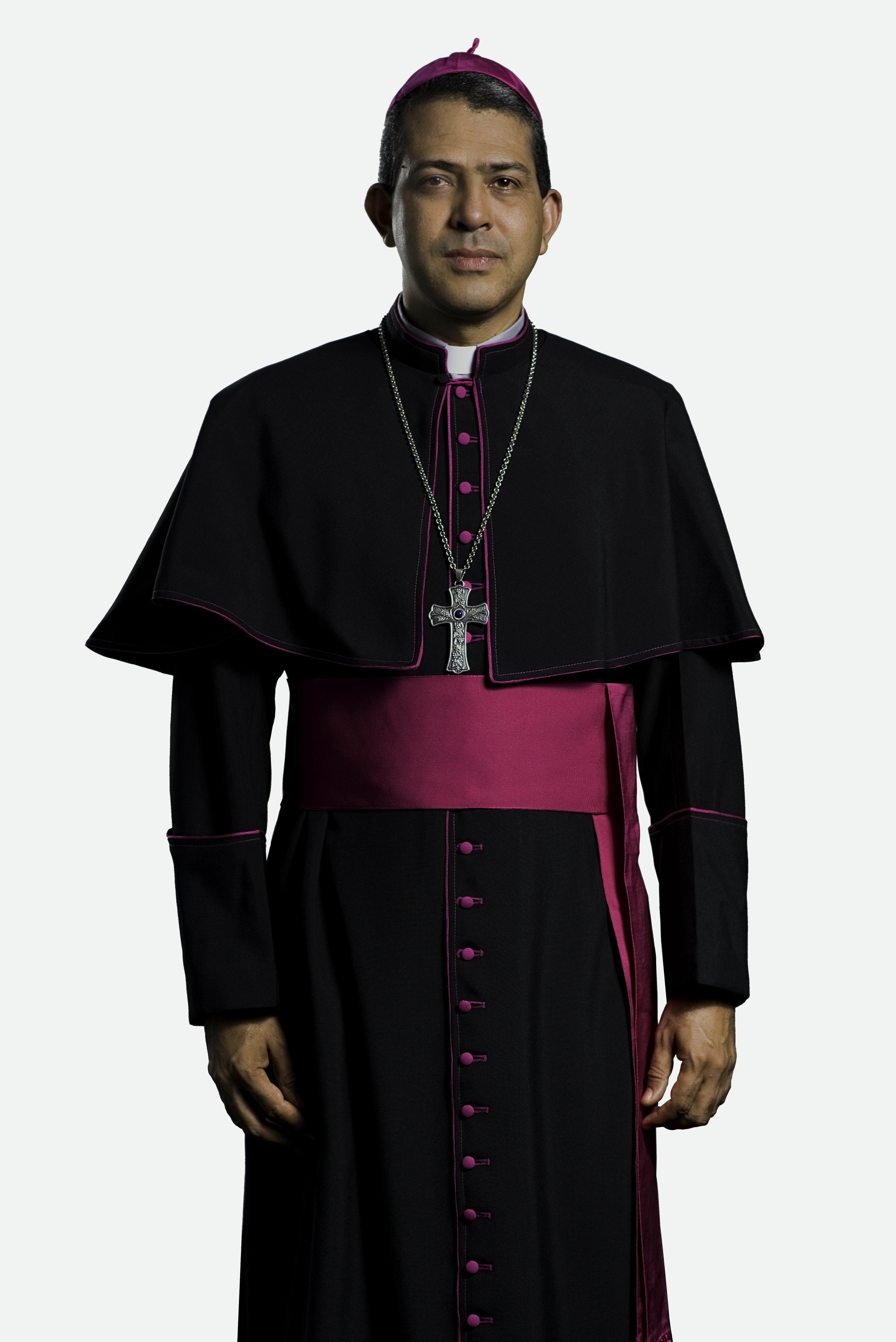 Obispo Auxiliar de Santiago de los Caballeros